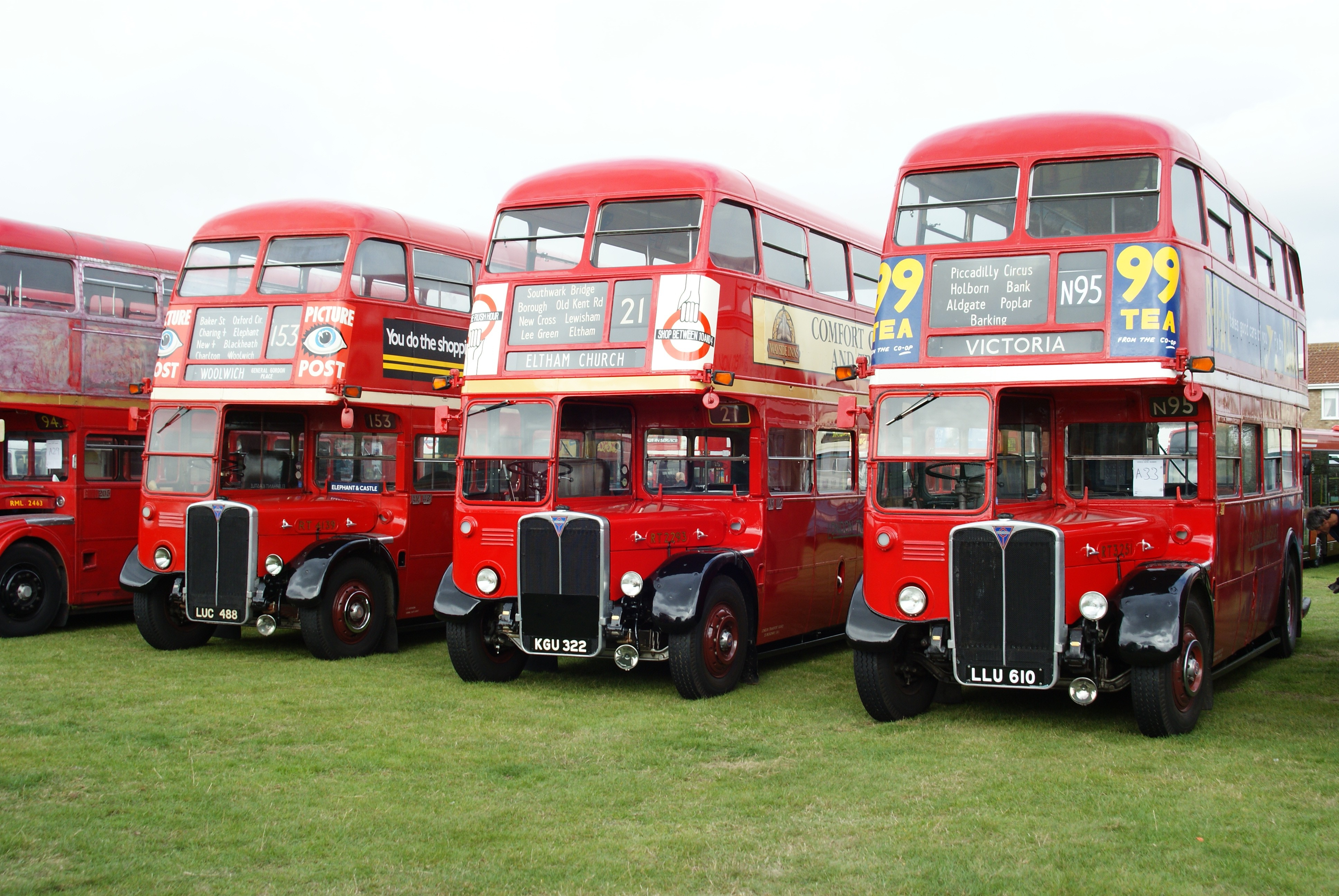 LUC488-KGU322-LLU610 111009 CPS